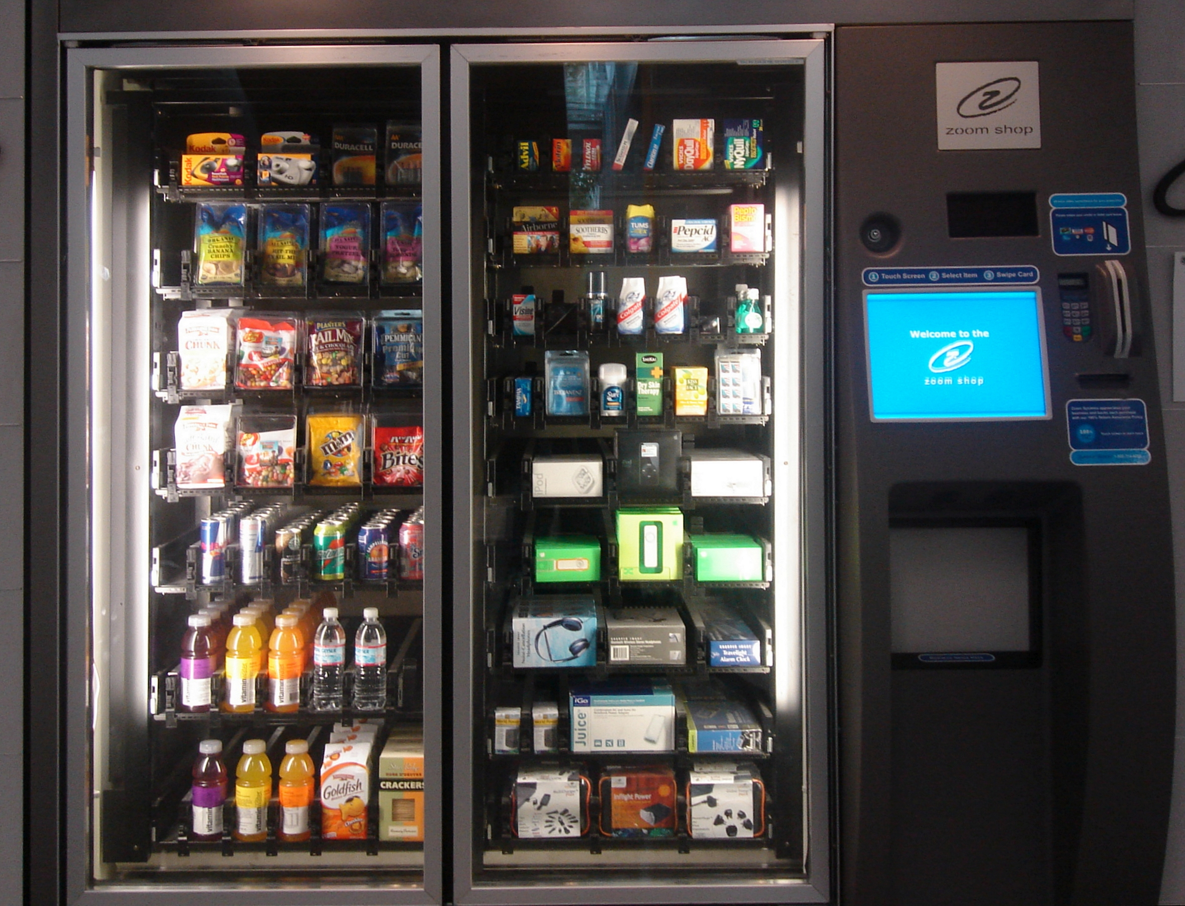 SFOで見つけた、コンビニのような品揃えの自動販売機「Zoom shop」。 ジュース、おやつ、カメラ、化粧品、電化製品、歯ブラシ、歯磨き粉、ヘッドフォン、etc…。 iPodも売ってました。↓この記事によれば、この自販機で一番売れている商品は、iPodなんだそうです。 zoom shop